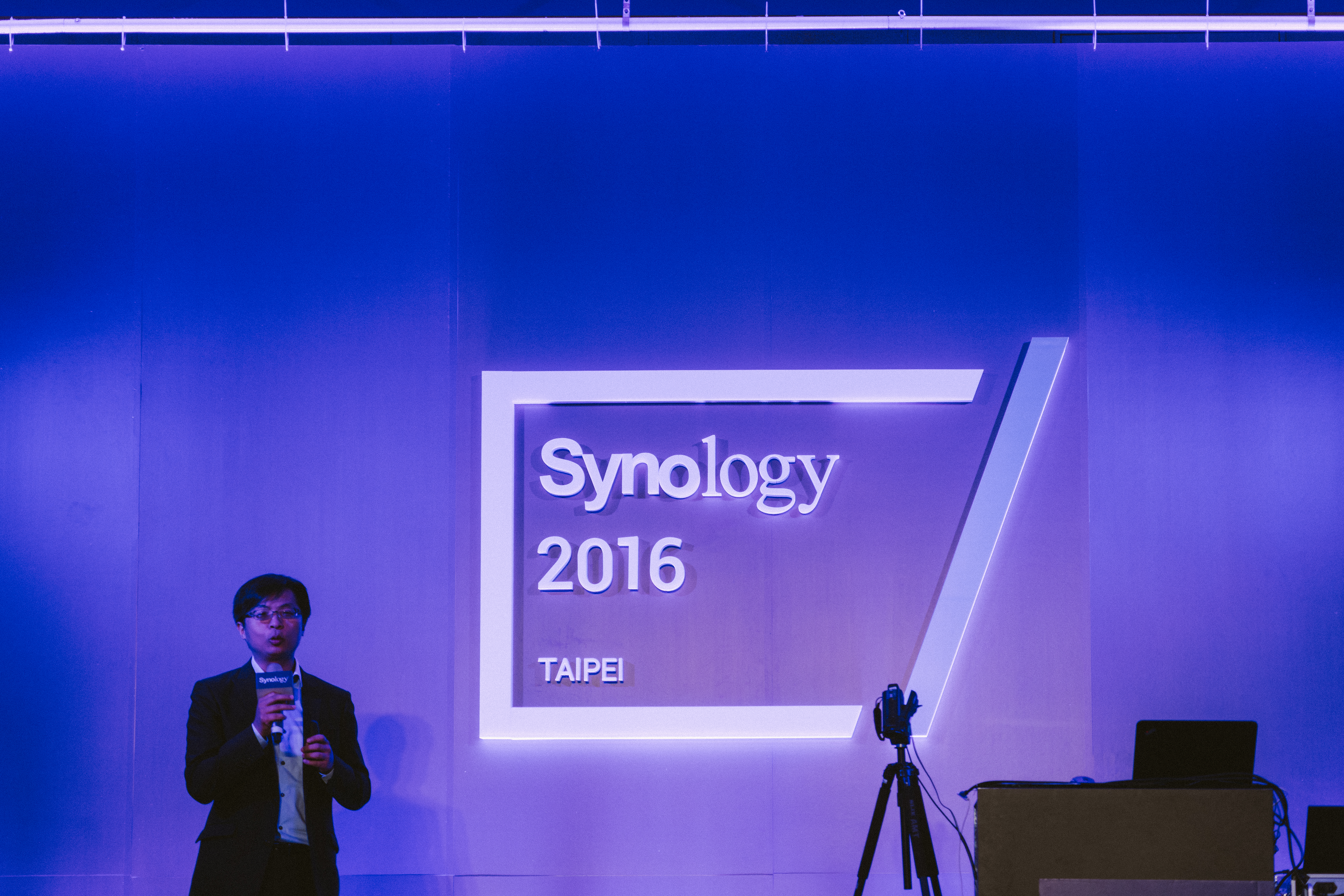 群暉科技首席技術官呂青鴻出席群暉科技2016年度發表會。